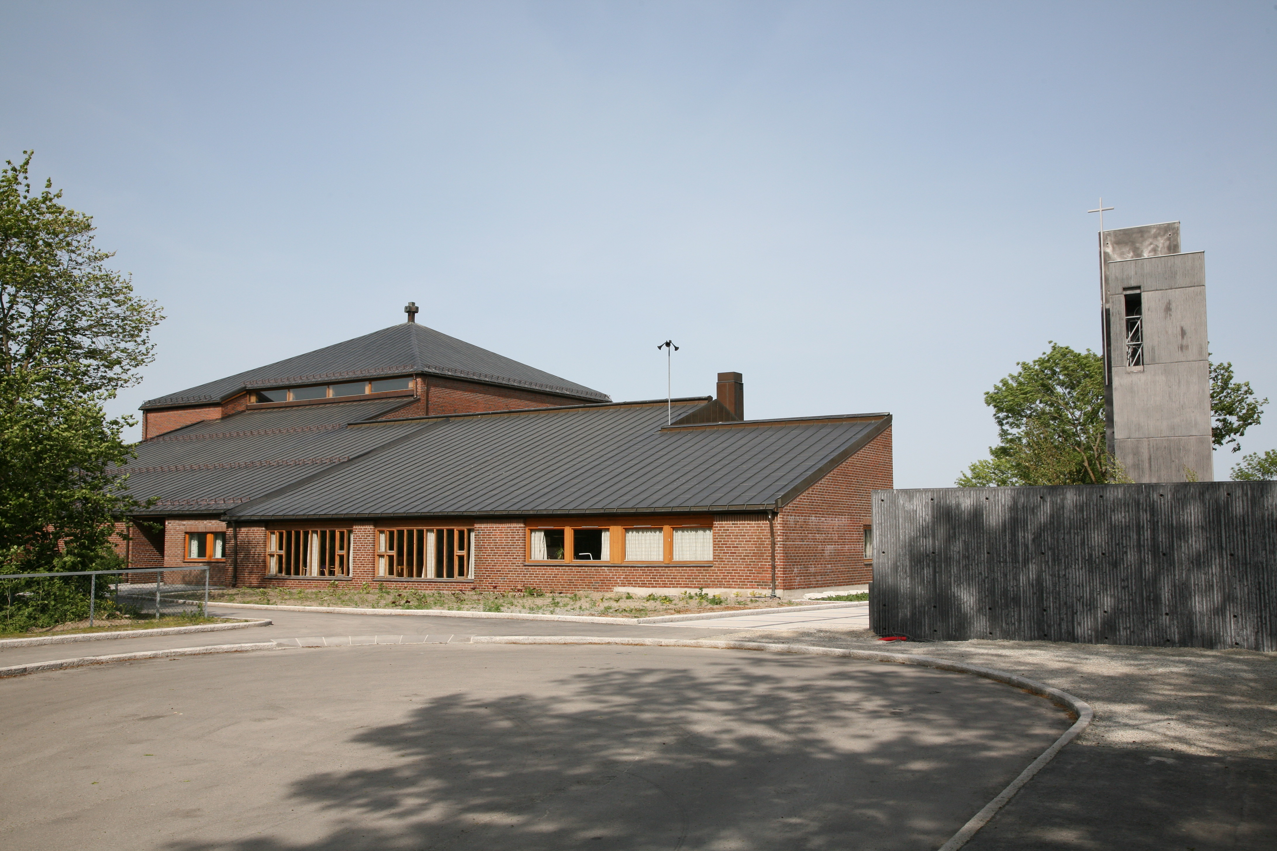 Østenstad church in Asker, Norway